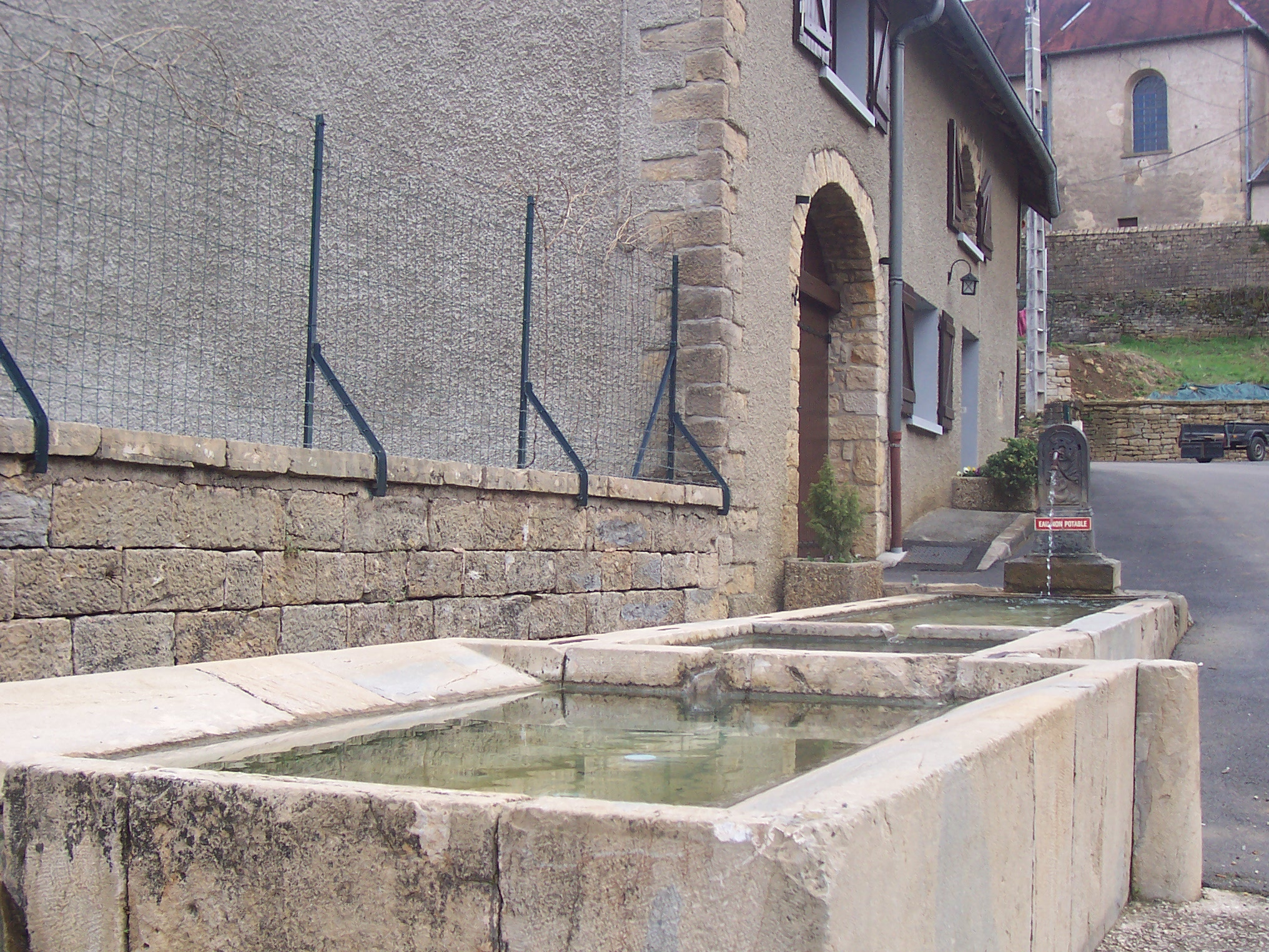 Fontaine Rue de la Cure Vieilley